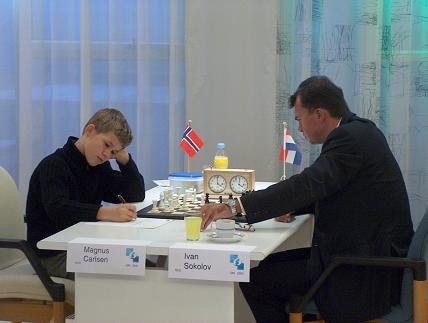 Carlsen tegen Sokolov, laatste ronde Essenttoernooi. Eigen foto.